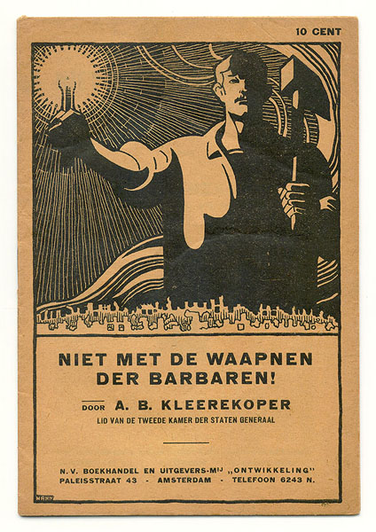 Pamflet SDAP. "Niet met de waapnen der barbaren!".